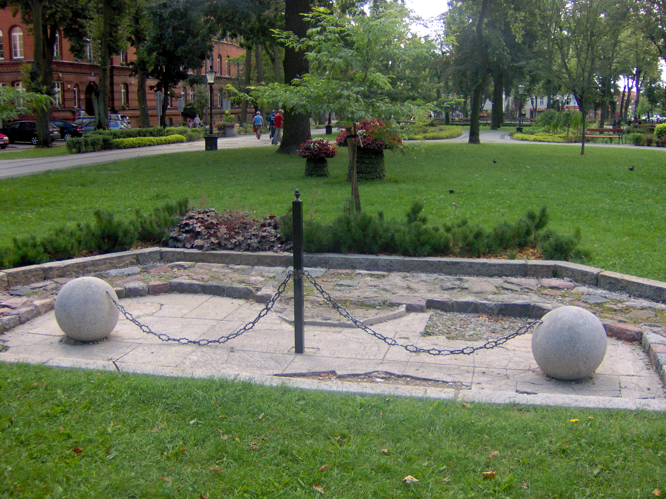 Park miejski im. Solidarności w Ełku (sierpień 2012). Pozostałości Pomnika Regimentu Piechoty Feldmarszałka Hindenburga